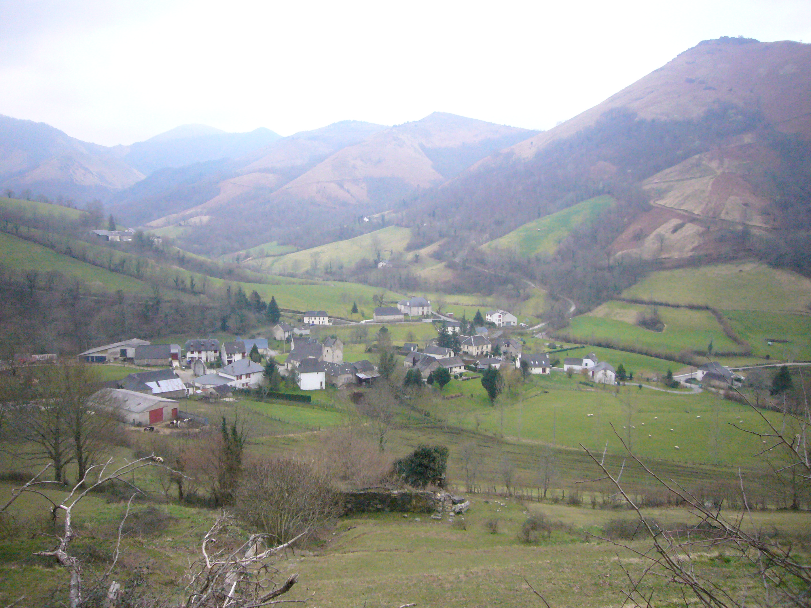 Village d'Haux (Pyrénées-Atlantiques)